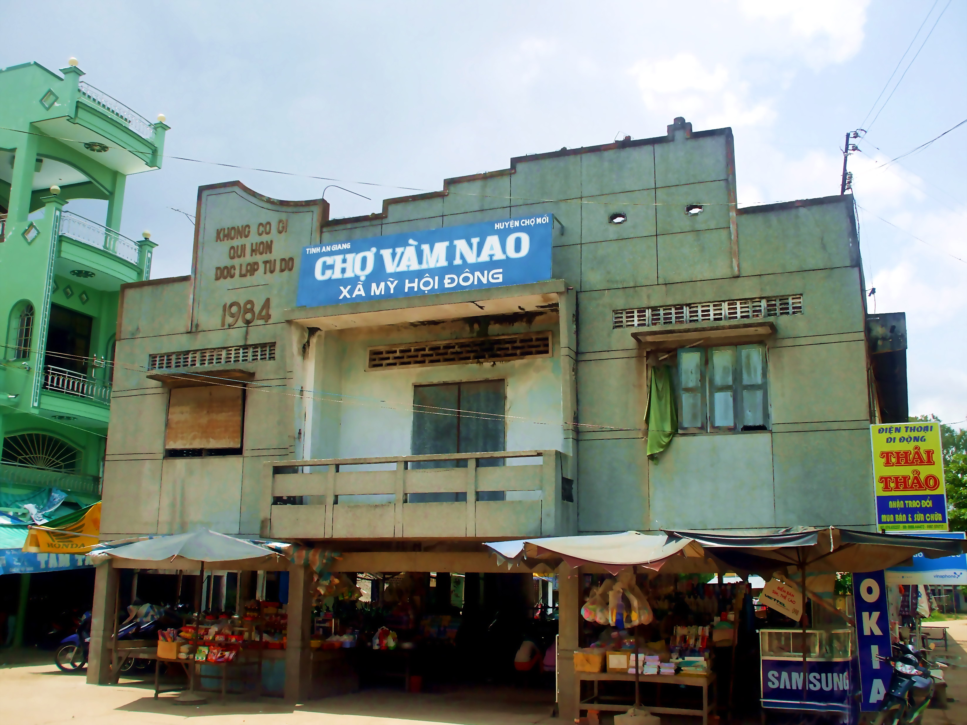 Chợ Vàm Nao là chợ nhất ở xã Mỹ Hội Đông, thuộc huyện Chợ Mới, tỉnh An Giang, Việt Nam.